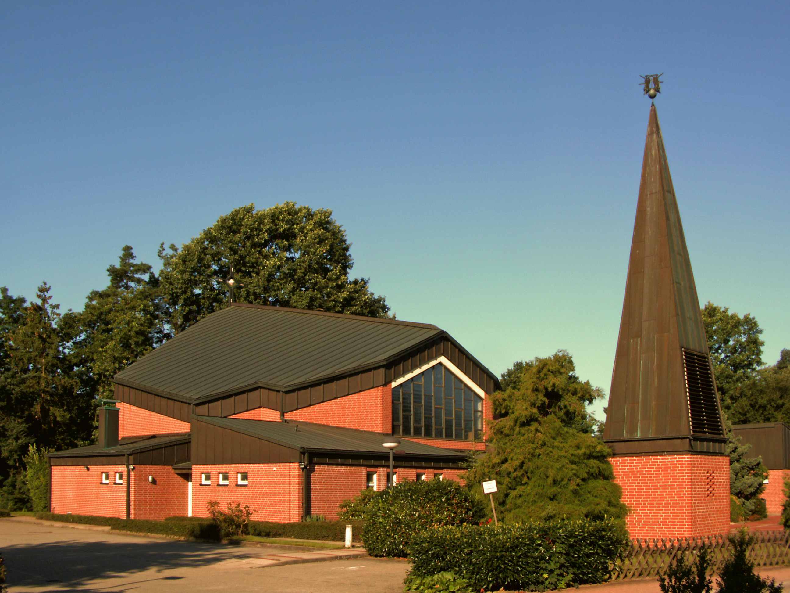 Neue katholische Kirche Heilige Schutzengel in Hambühren, Landkreis Celle